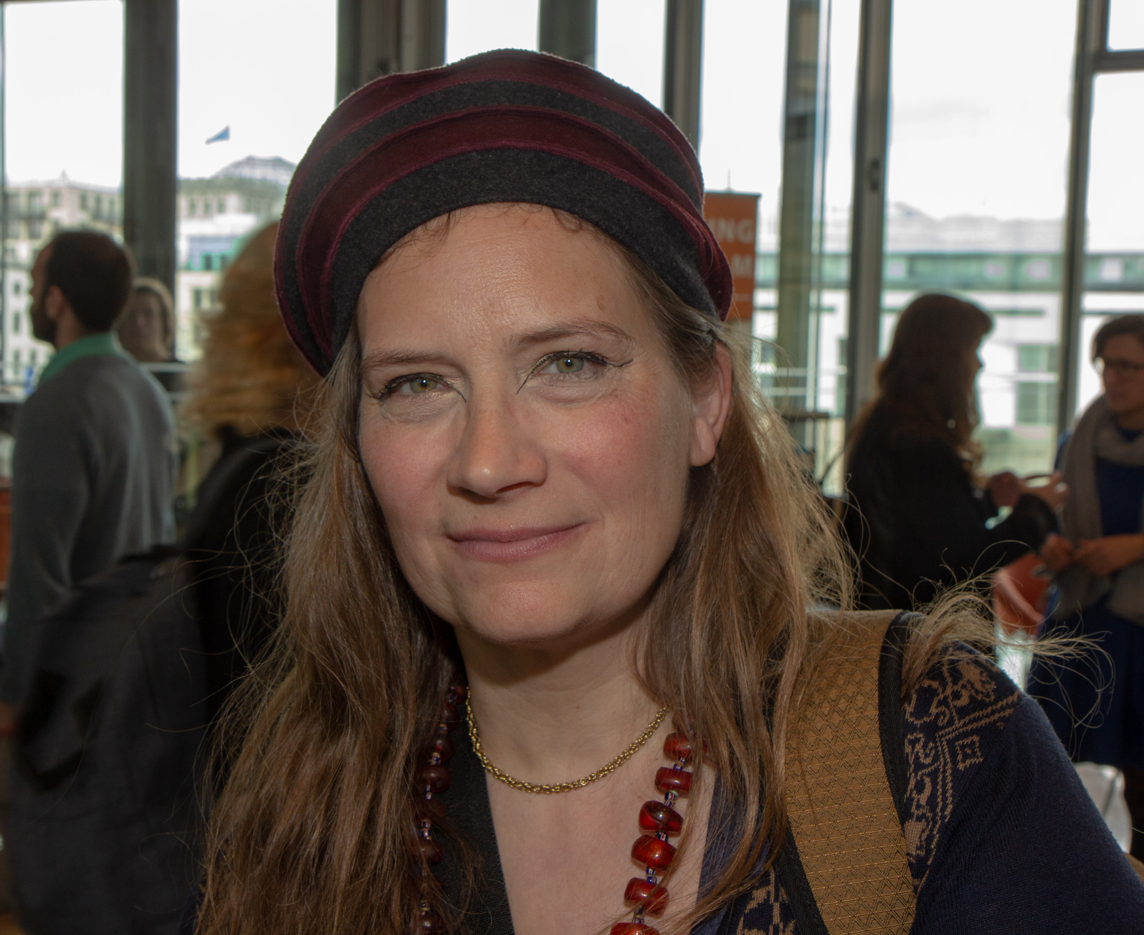 Veranstaltung "A Soul for Europe" am 13. April 2019 in der Akademie der Künste in Berlin. Representatives of European Parties: Carl Grouwet (ALDE), Damian Boeselager (Volt), Hannah Neumann (Bündnis 90/Die Grünen), Violeta Tomic (European Left), Yanis Varoufakis (DIEM25), Elmar Brok (MEP European People’s Party). With: Tanja Dückers, Noémi Kiss, Katja Sinko, Kathrin Röggla and Mia Florentine Weiss. Intervention by Volker Schlöndorff and Hannes Swoboda (former MEP). Moderation: Volker Hassemer